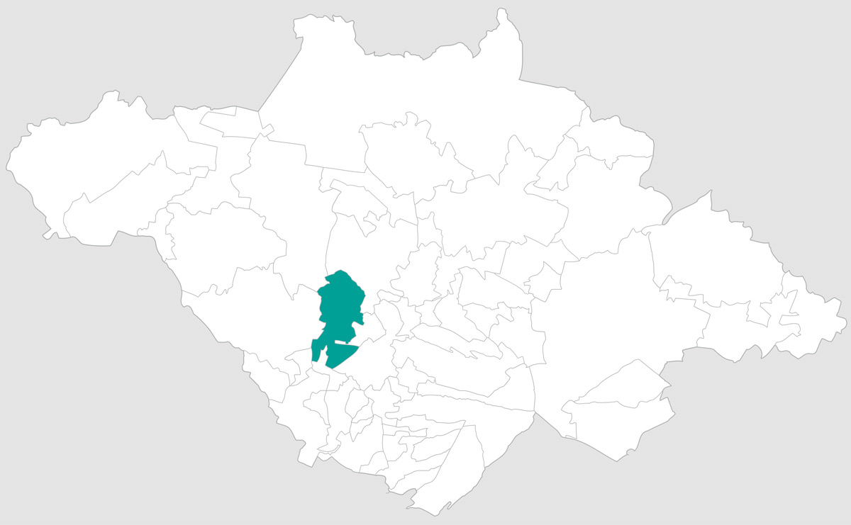 Mapa del municipio de Panotla, Tlaxcala.